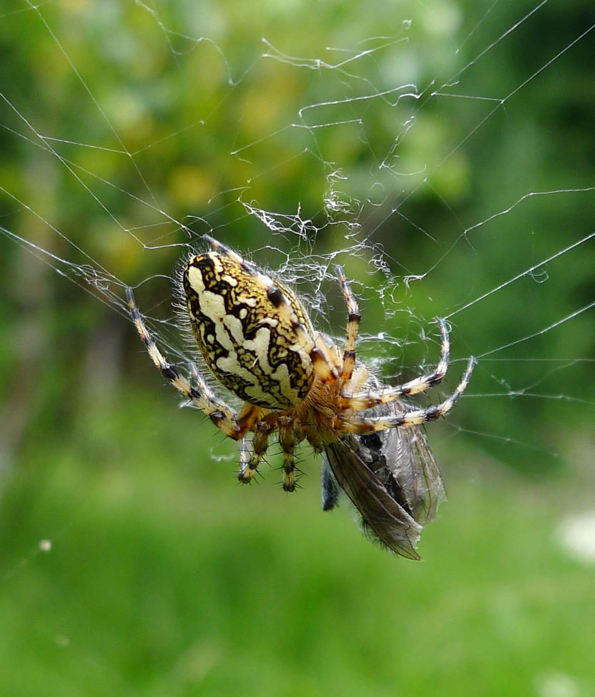 Aculepeira ceroegia. Araneidae. Female